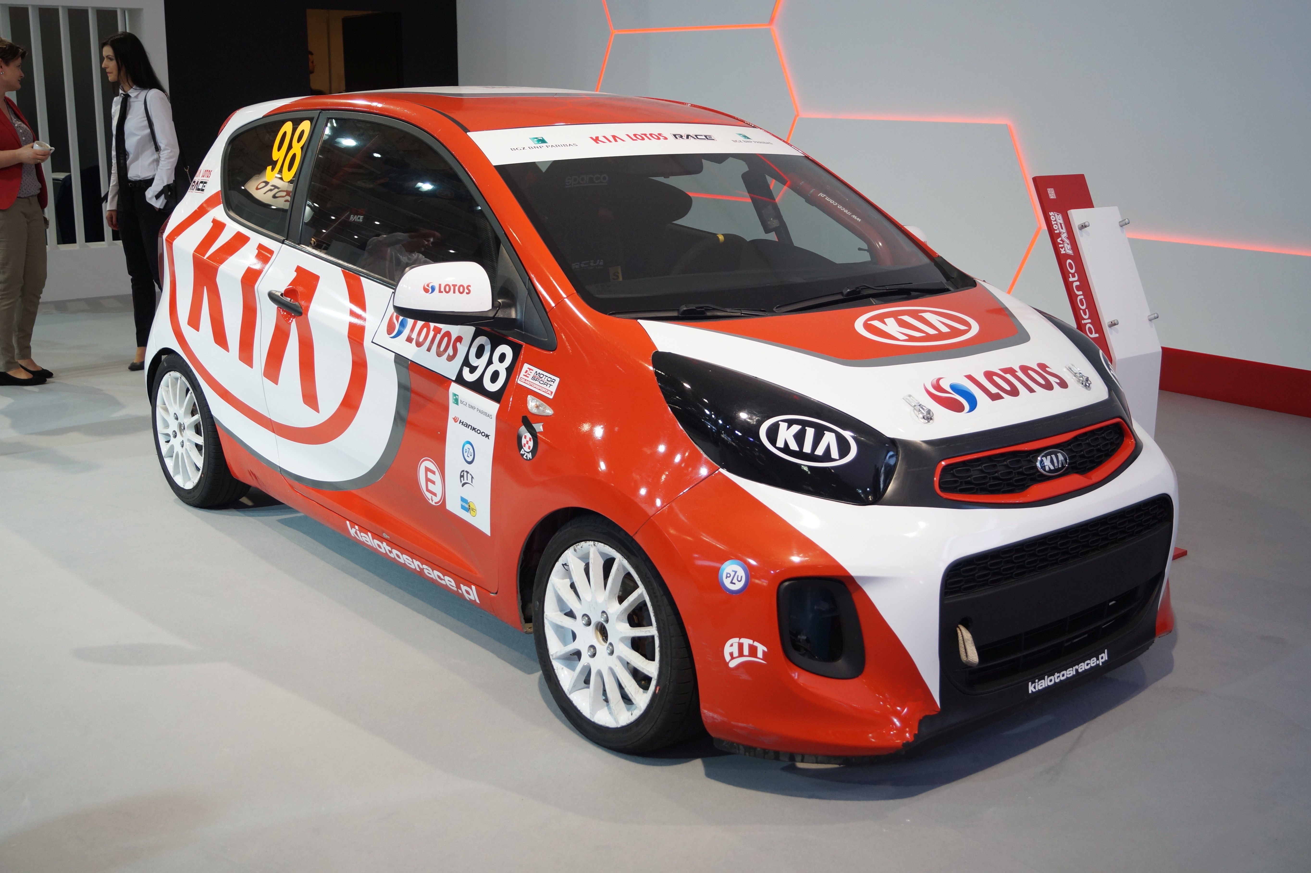 Kia Picanto przygotowana do startów w KIA Lotos Race na Motor Show Poznań 2017.